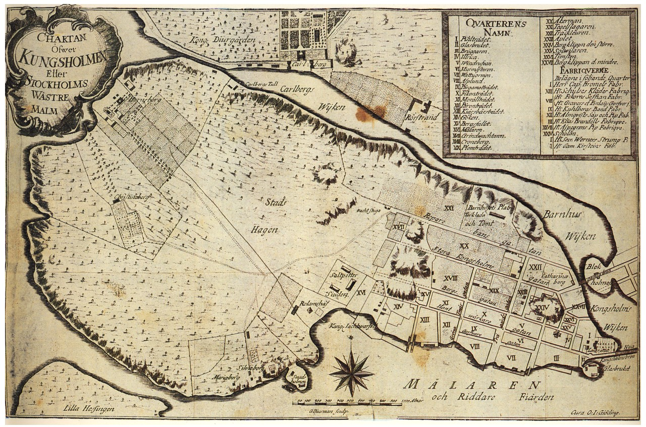 Karta över Kungsholmen, Stockholm år 1754